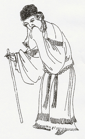 喪服的一種